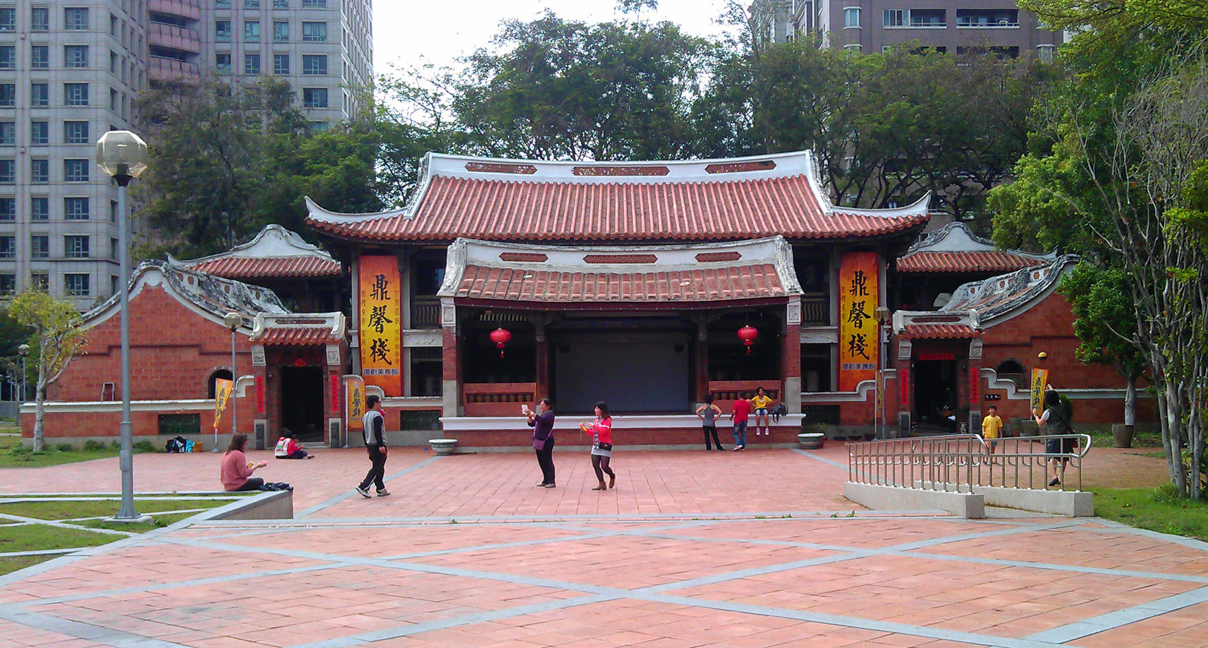 中文（台灣）: 民俗公園民藝館